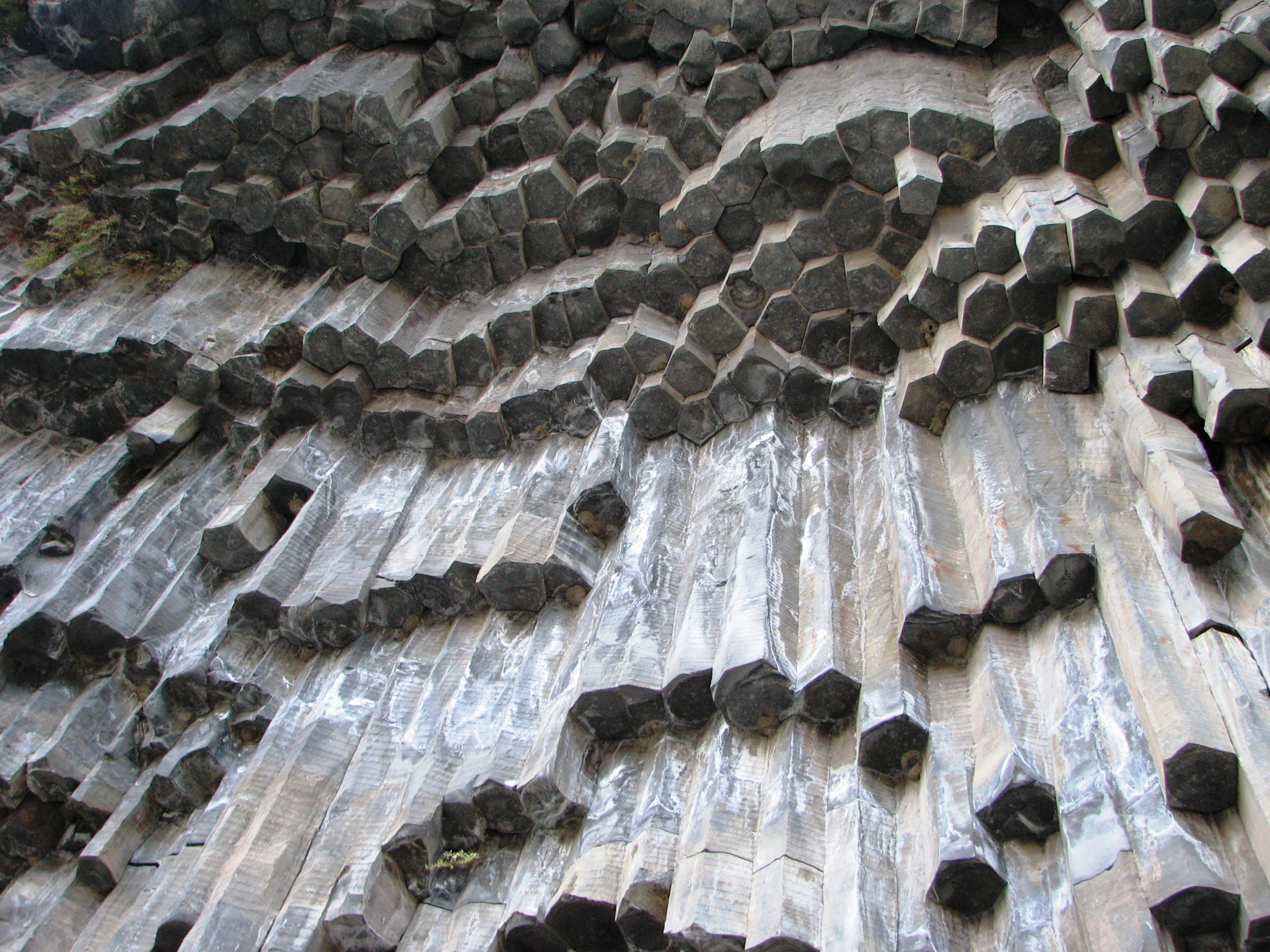 Garni Gorge is situated 23 km east of Yerevan, Armenia קניון גרני נמצא מזרחית לירוואן בירת ארמניה. התופעה המייחדת את הקניון הם עמודי בזלת בצורת משושים